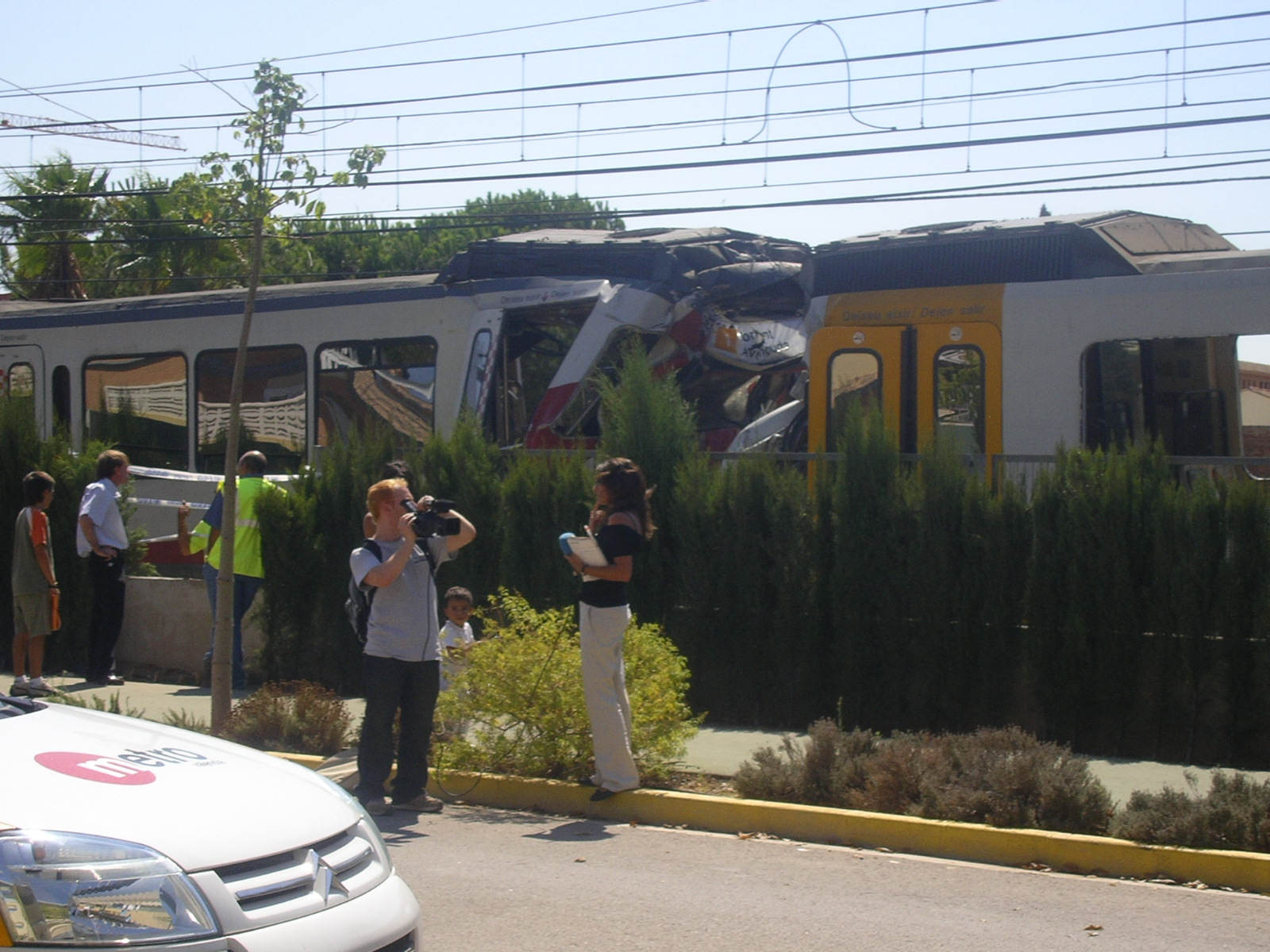 Accident de metro al terme municipal de Picanya junt al pavelló (prop de Paiporta)